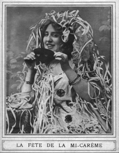 Jeune fille avec serpentins, qui sont beaucoup plus larges et longs que ceux d'aujourd'hui.